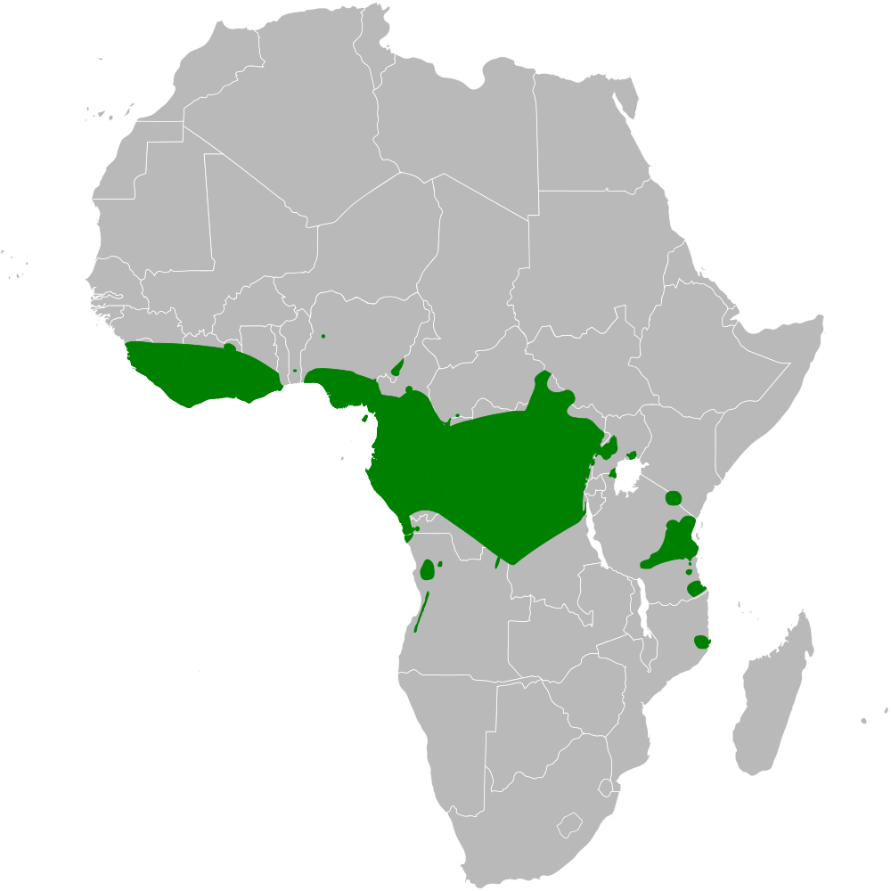 Macrosphenus distribution map